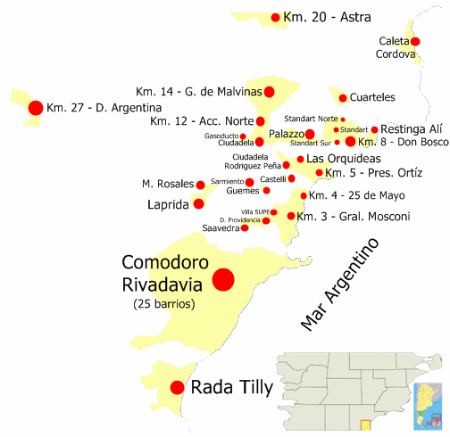 Mapa de la urbe actualizado, 2013, con sus principales barrios